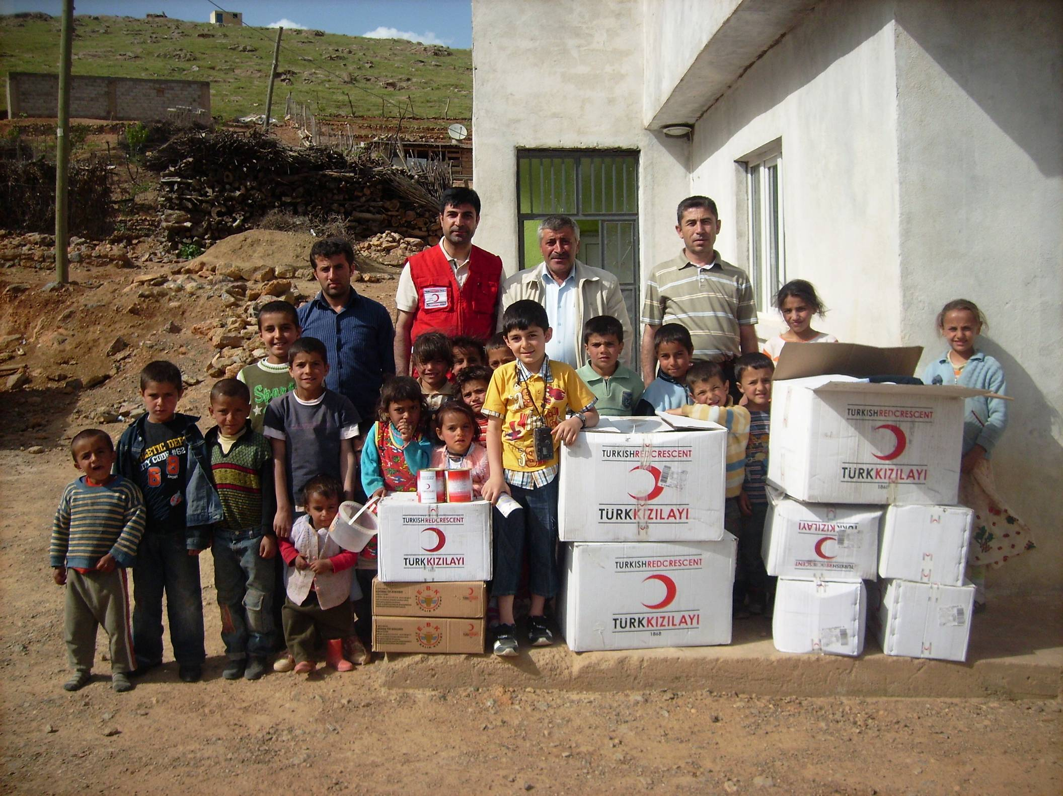 Siirt Kızılay Derneği